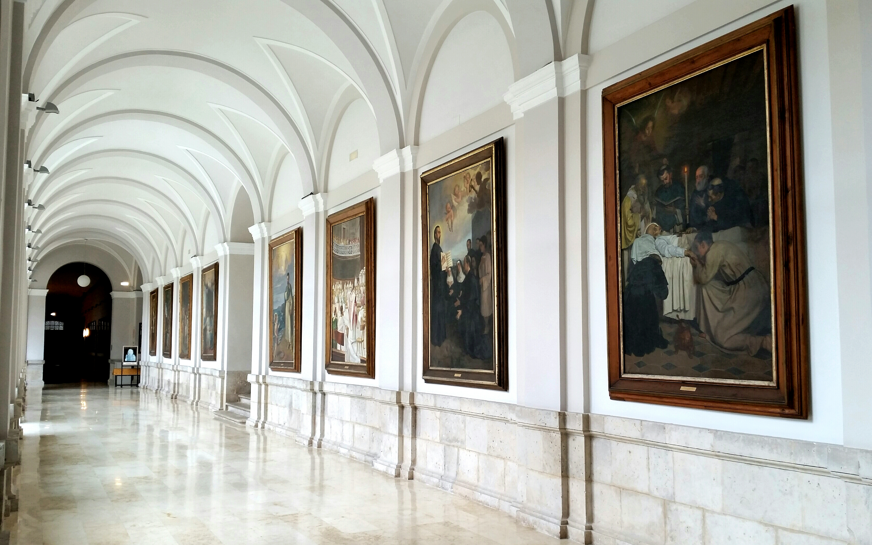 Pablo Puchol.- Claustro del Convento de los Agustinos Filipinos (Valladolid).